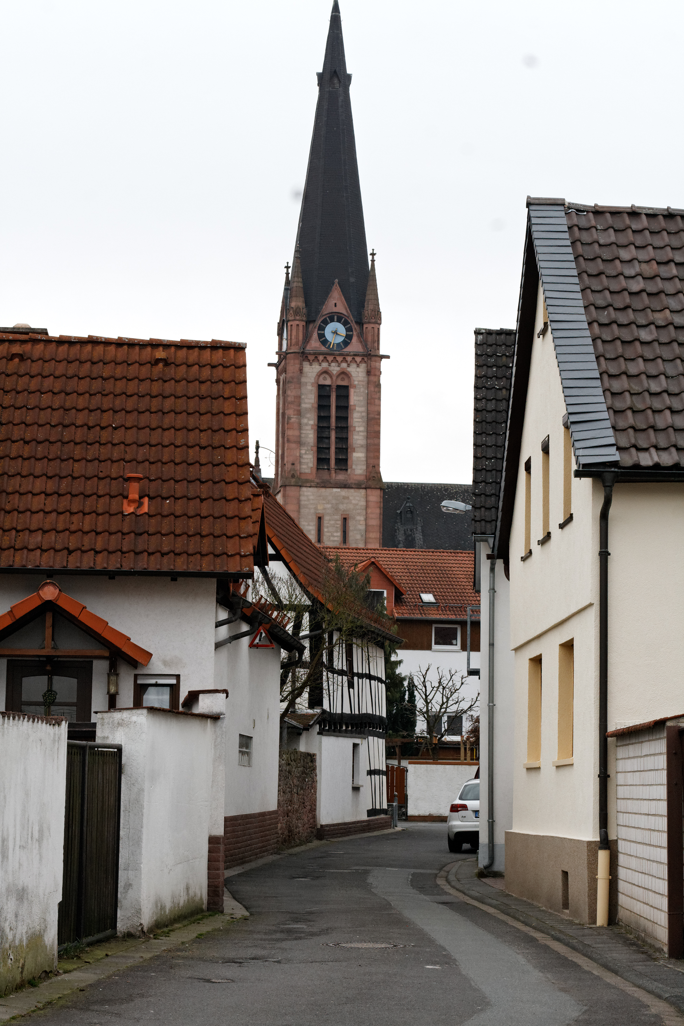 Enggasse in Ober-Roden, einem Stadtteil von Rödermark: Im Ortskern ist die alte Grundriss- und Straßenstruktur eines Rundlings noch erhalten. Die Enggasse ist auf die Kirche St. Nazarius ausgerichtet.